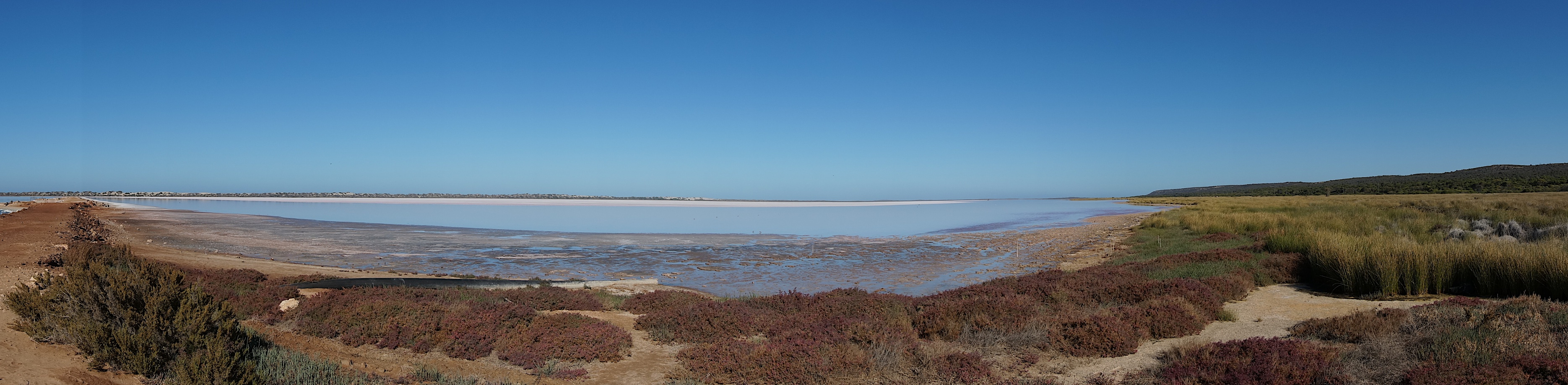 Hutt Lagoon, Western Australia